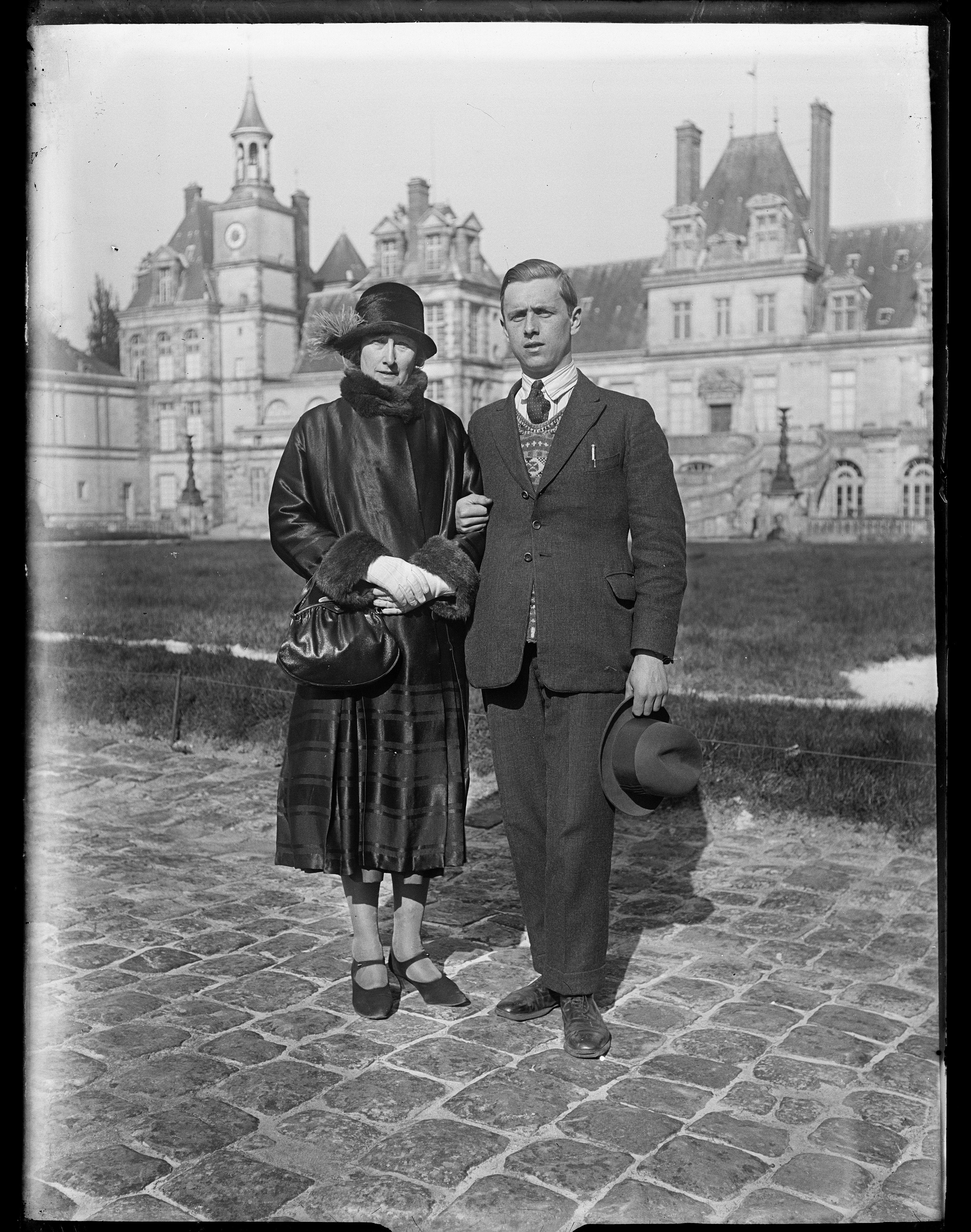 Beschrijving Eugenie en August Zeegers Eugenie Zeegers-Kuinders, de vrouw van de fotograaf, met hun zoon August voor een monumentaal gebouw. (Wellicht Duitsland 1928?) Documenttype foto Vervaardiger Zeegers, Jan Collectie Collectie Jan Zeegers Datering 1925 t/m 1930 Inventarissen Afbeeldingsbestand 010029000485 Generated with Dememorixer